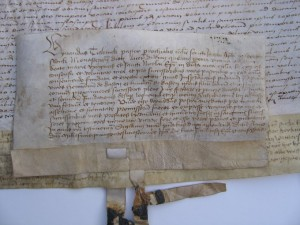 Transfix door officiële bevestiging van de oprichting van Stichting Vicarie Sancti Nicolai als vicariestichting uit 1502. Met de hand zijn in de marge meerdere percelen toegevoegd aan het landgoed, in een tijd dat er nog geen kadaster bestond